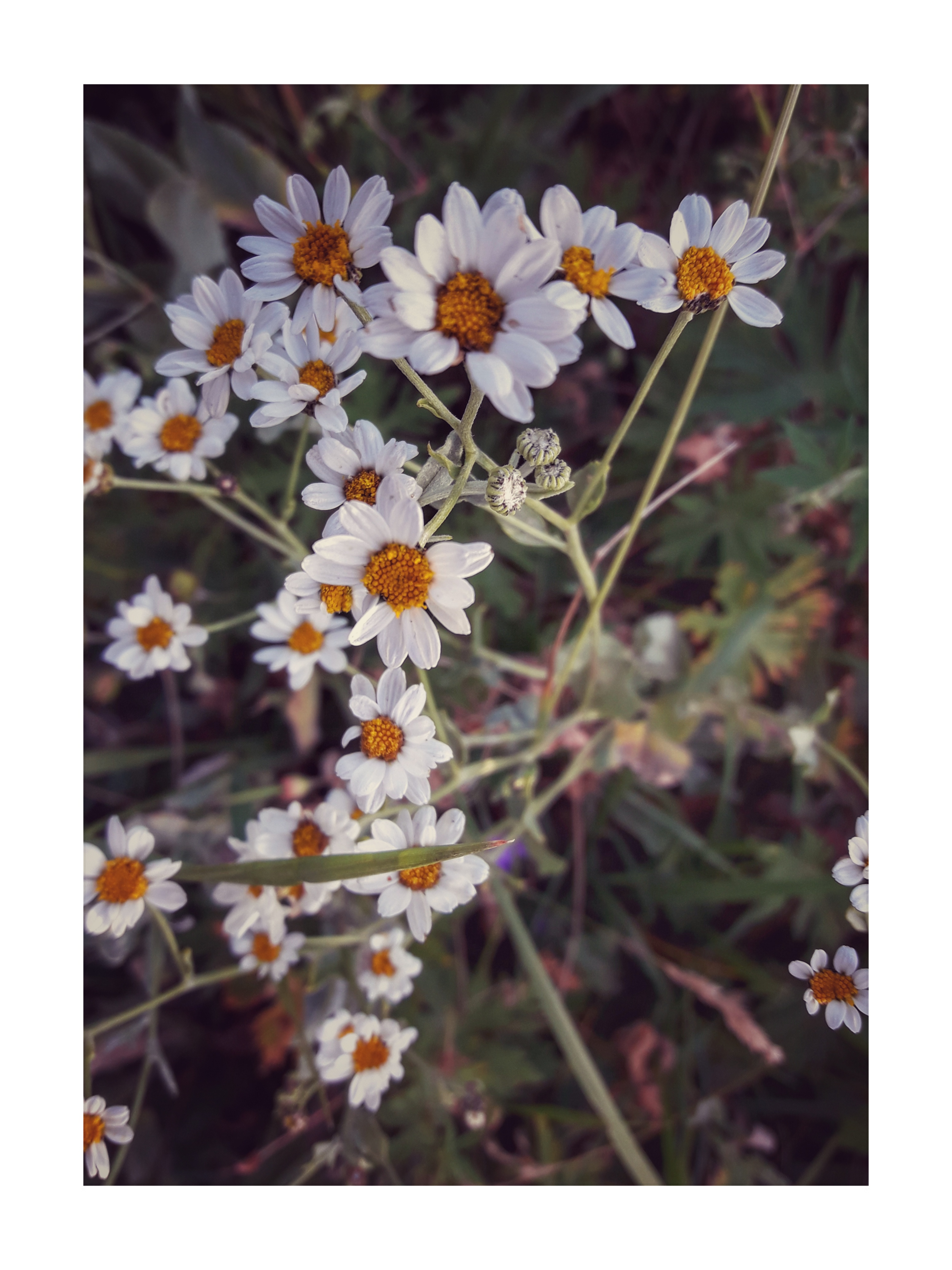 երիցուկ